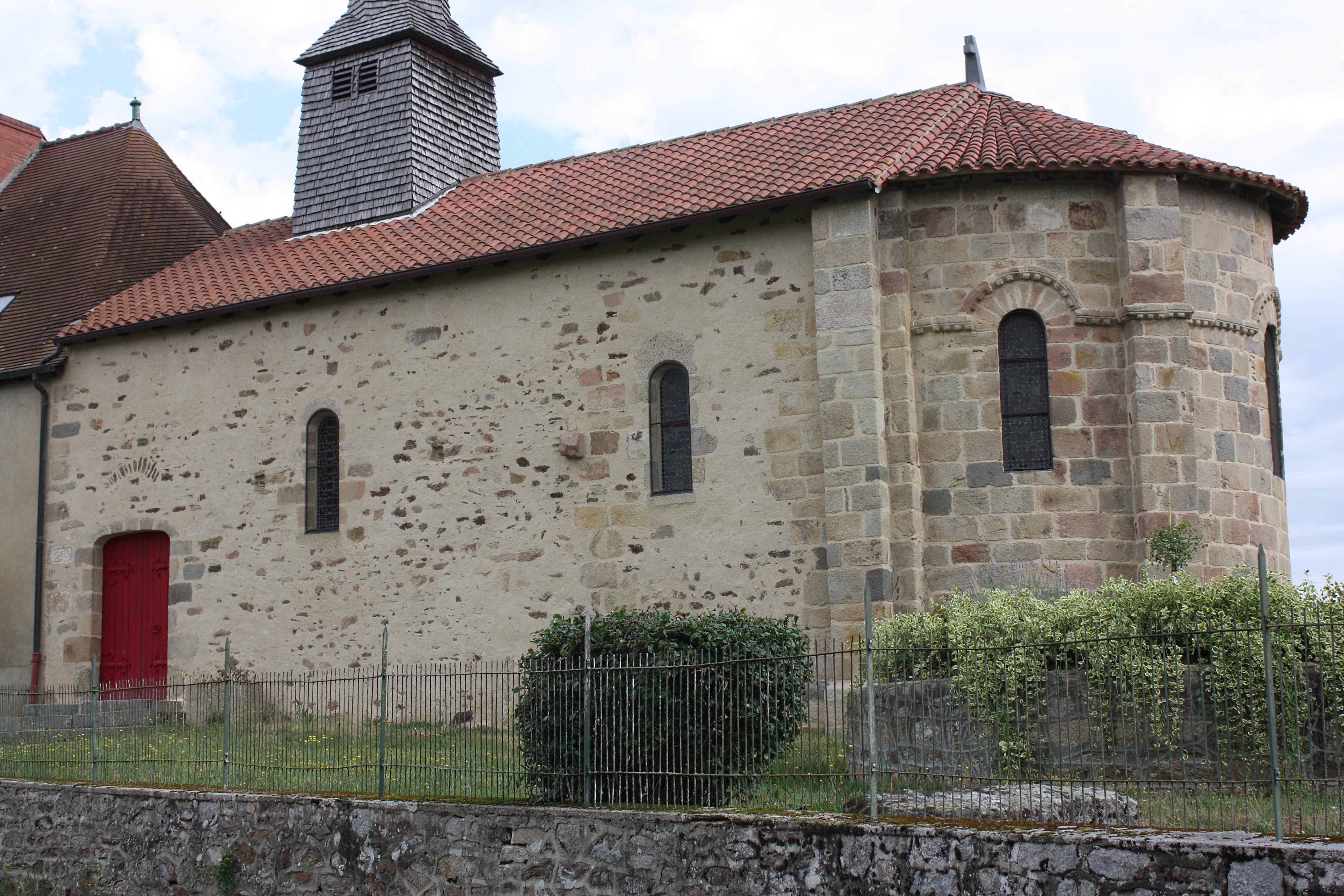 Auge - Eglise Saint-Symphorien